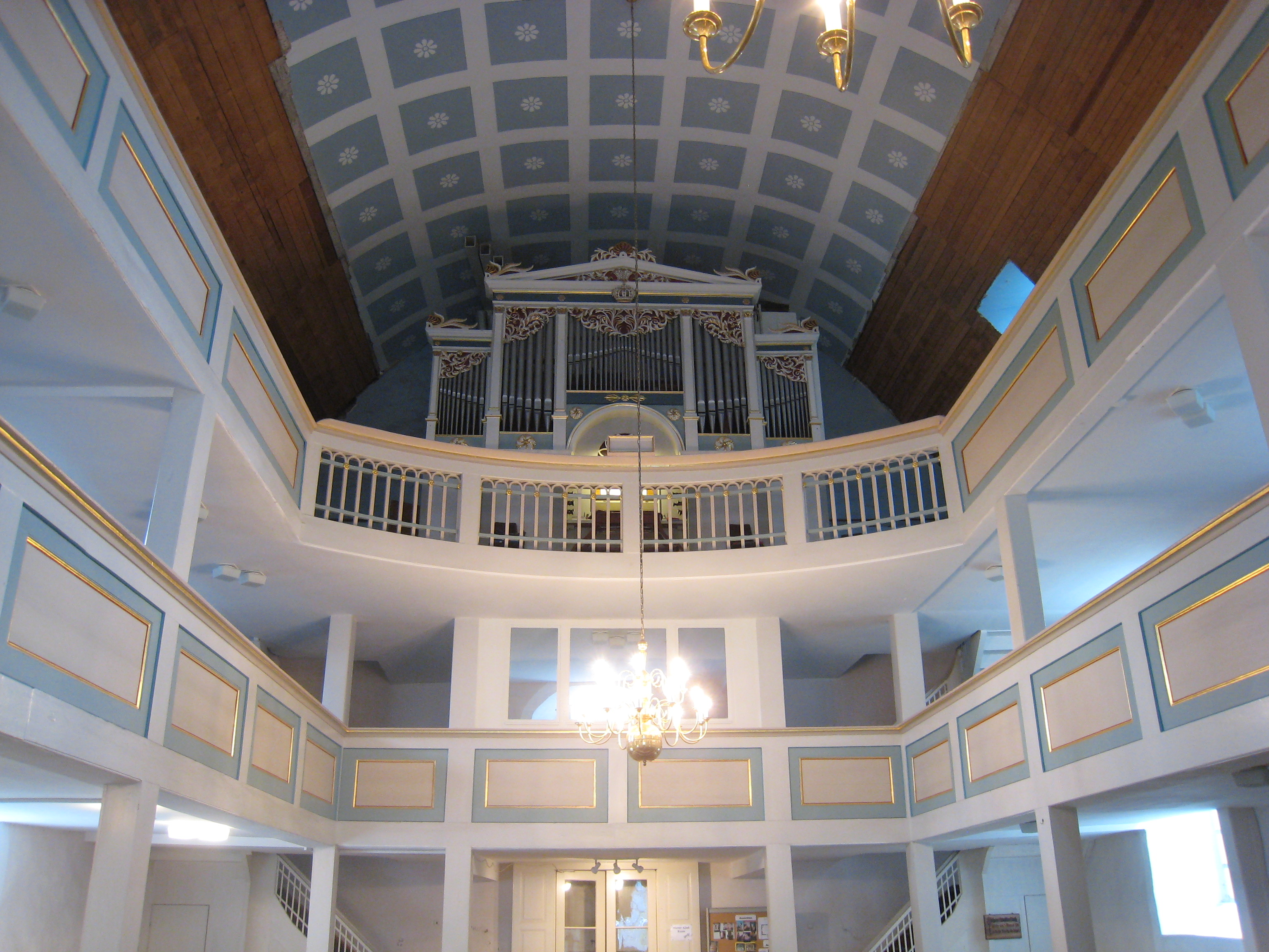 Orgel und Empore in der Marienkirche in Langewiesen